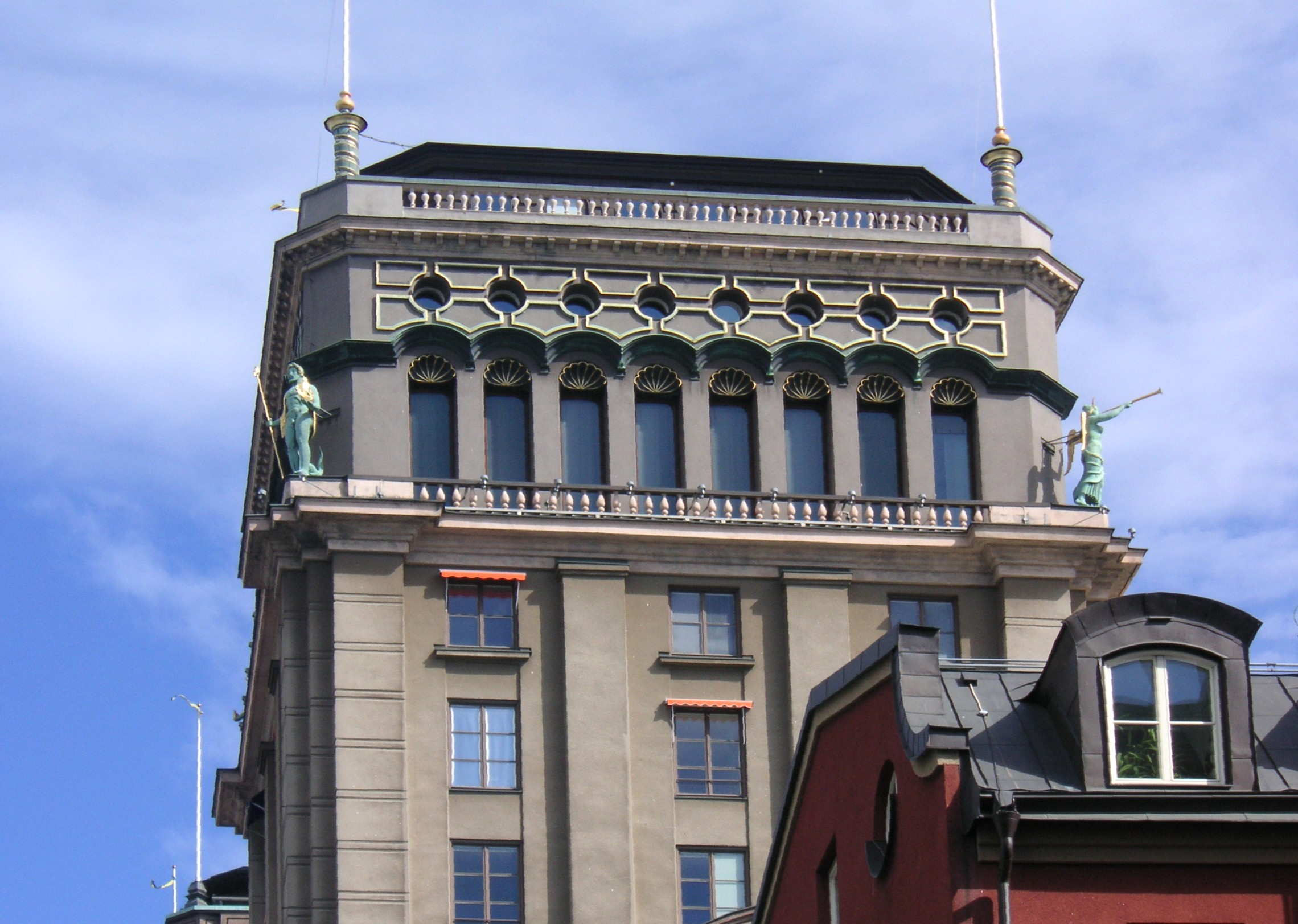 Södra Kungstornet i Stockholm, detalj